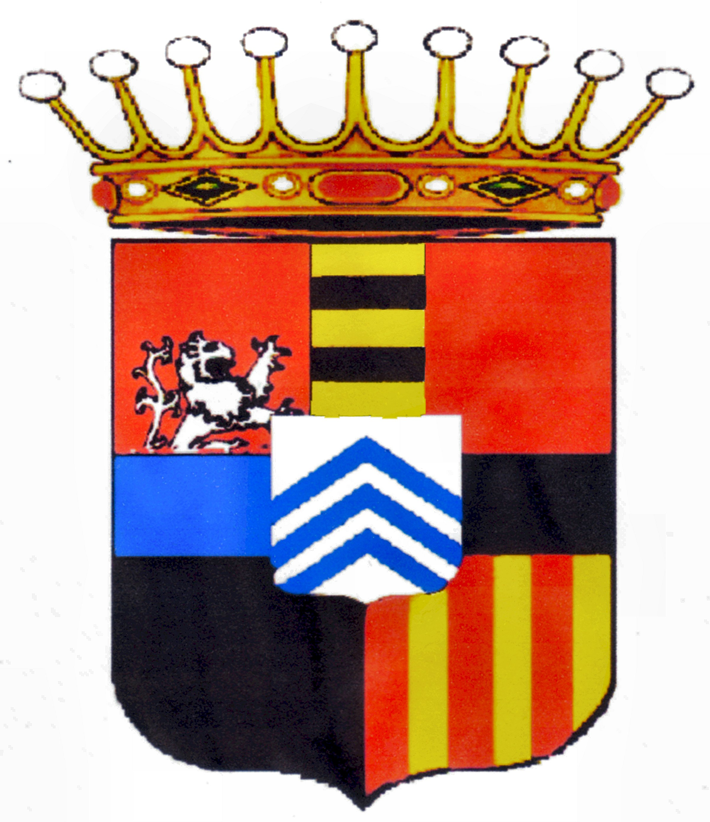 Wappen der Grafen von Braida Ronsecco und Cornigliano vor 1835 (vermehrtes Wappen), nach J. A. Tyroff : "Wappenbuch der Österreichischen Monarchie", Verlag Conrad Tyroffsches Wappen-, auch Kunst- und Kommissionsbureau, Nürnberg 1835, Band 7 T. 5 (Digitalisat)